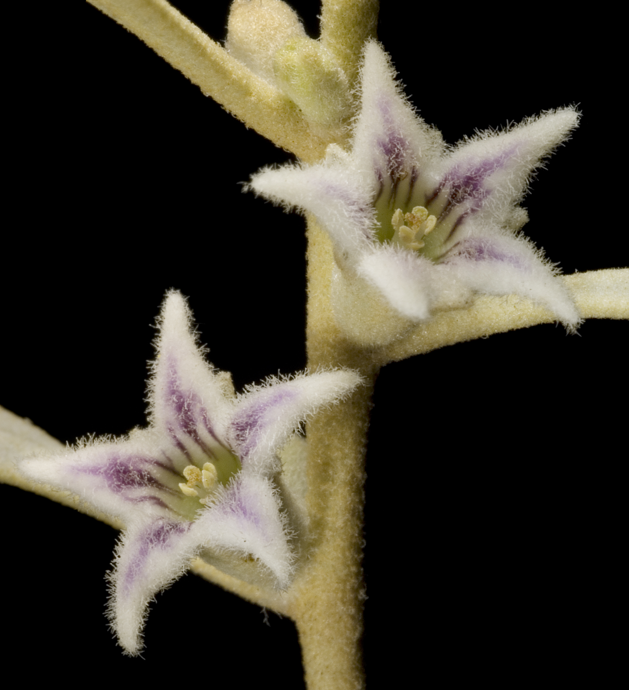 KRT3395